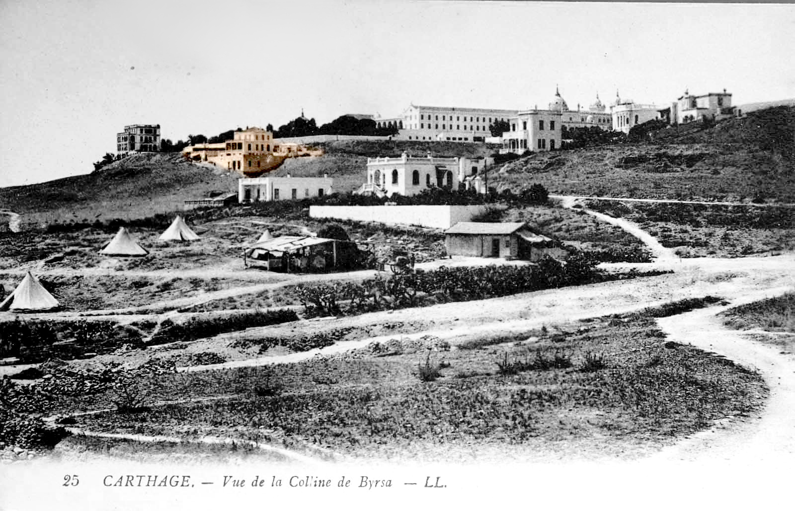 Carthage - Villa Saumagne (en surbrillance) entre 1906 et 1910